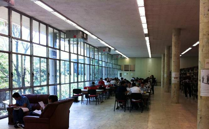 Universidade Federal RJ